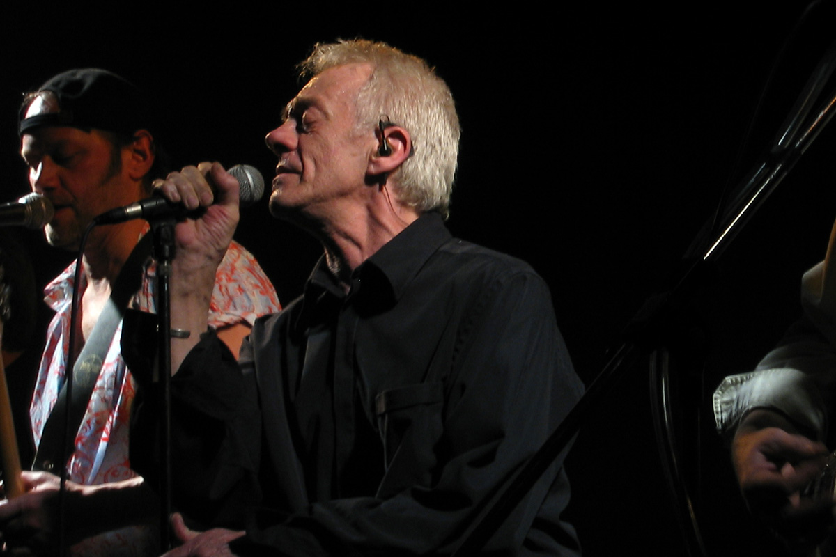 Mike Harrison